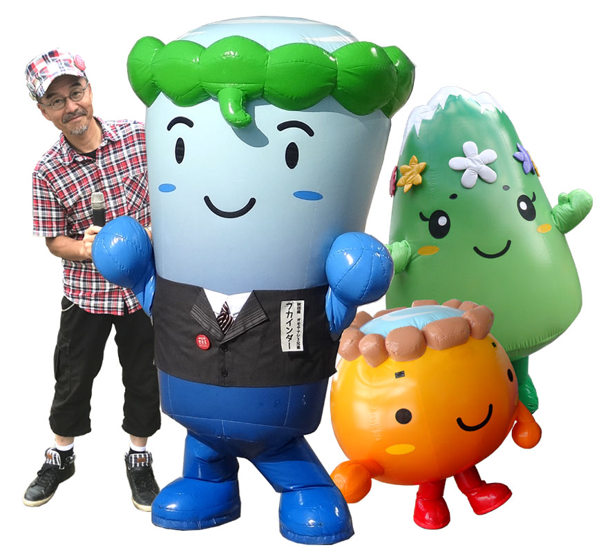 オモテナシ３兄弟のフカインダー、ヌクインダー、イヤスンダーの３人と生みの親である土屋パパとの写真です。2017年夏のイベントで撮影。